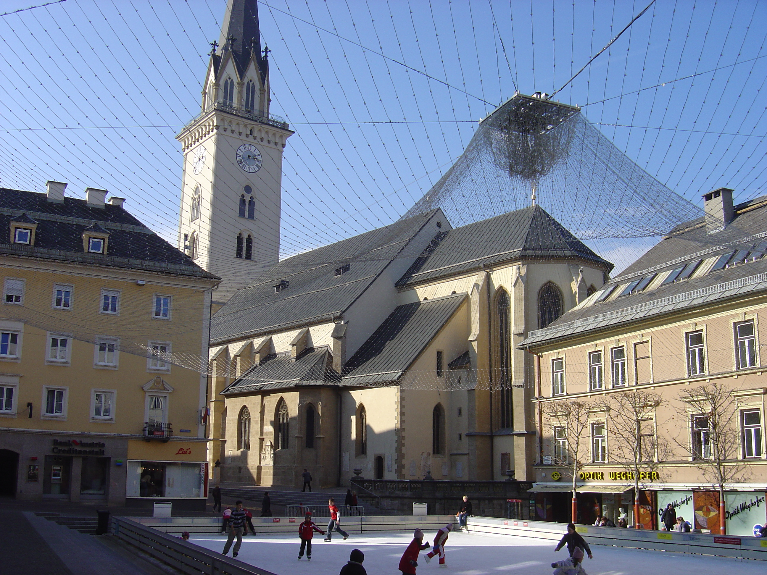 Rathausplatz, Villach, Austria